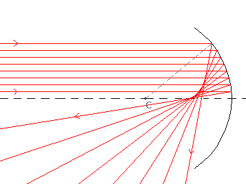 Schéma miroir sphérique concave hors Gauss (Schéma personnel) Catégorie:Schéma de physique